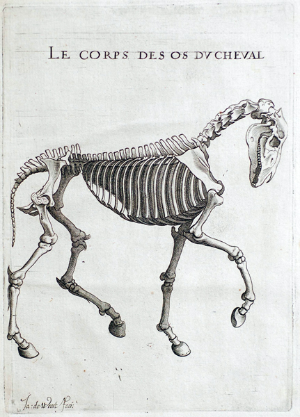 Planche du squelette du cheval, par Jean Héroard.